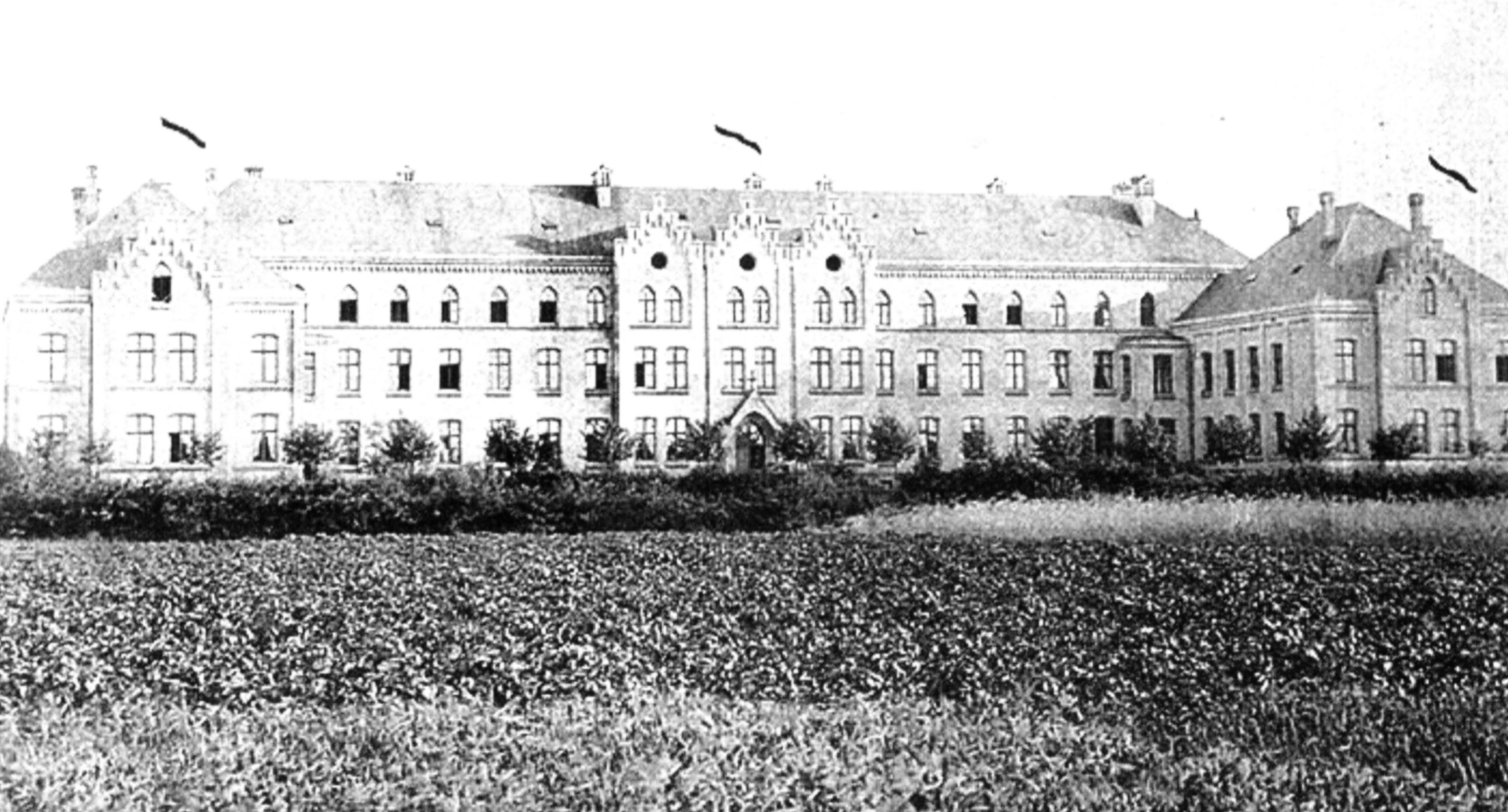 Das Königlich-Preußische Seminar zu Uetersen um 1884, heute die Ludwig-Meyn-Schule (Ludwig-Meyn-Gymnasium = LMG)